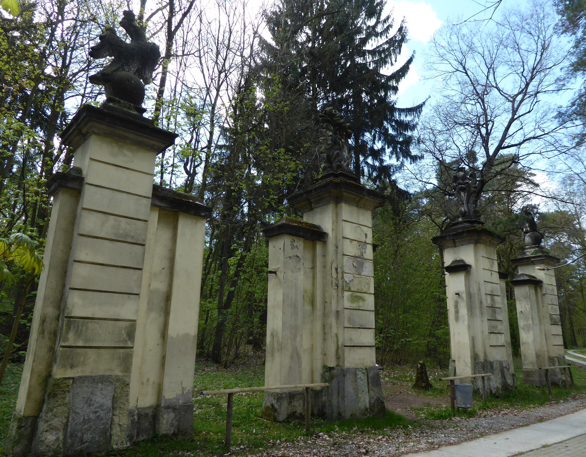 Haupttor des ehem. Lustschlosses Friederikenberg bei Badetz